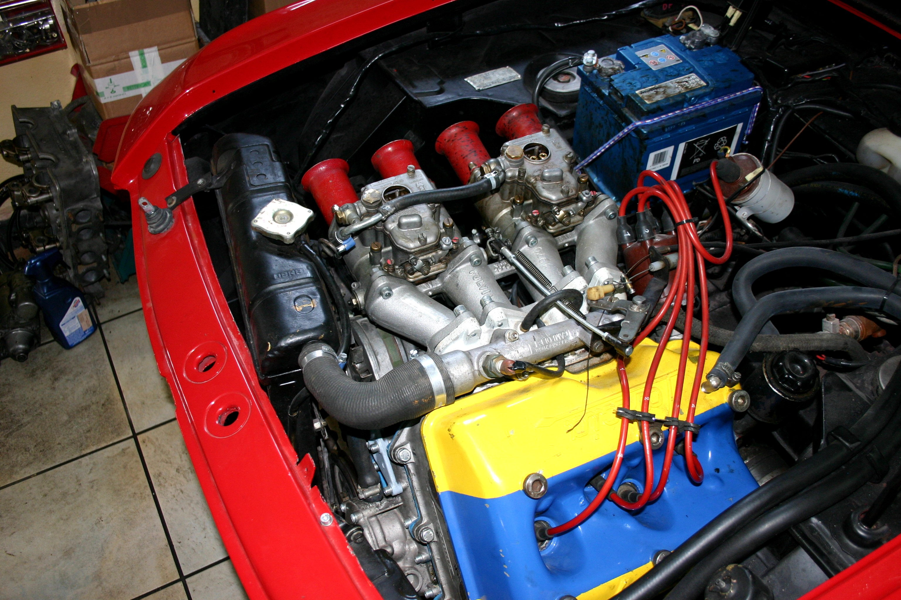 Motore Lancia Fulvia 1600 competizione - raffigura il classico motore Fulvia a V stretto inclinato per motivi d'ingombro. La versione ripresa monta carburatori Weber da 48.